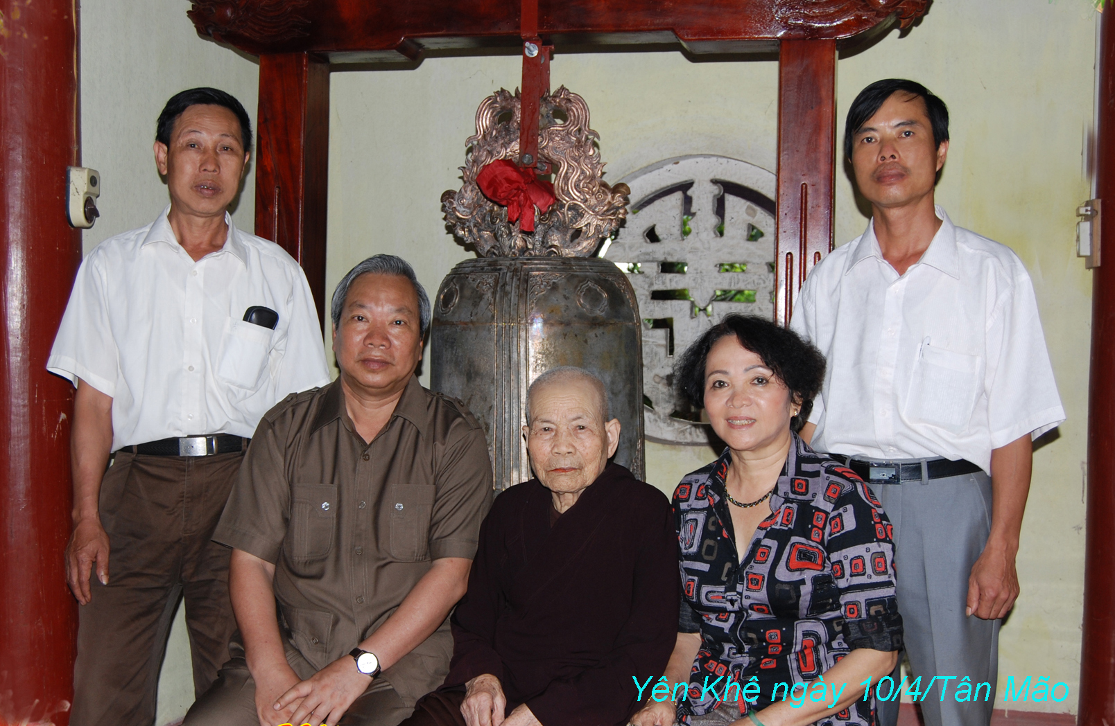 Chuông